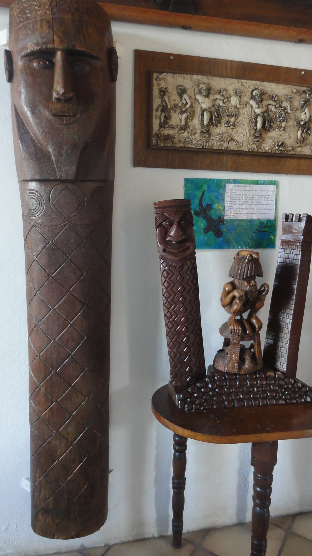 Musée de Bourail